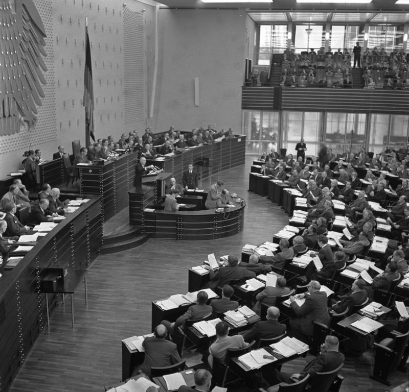 16.12.1954 Erste Lesung der Pariser Verträge im Deutschen Bundestag